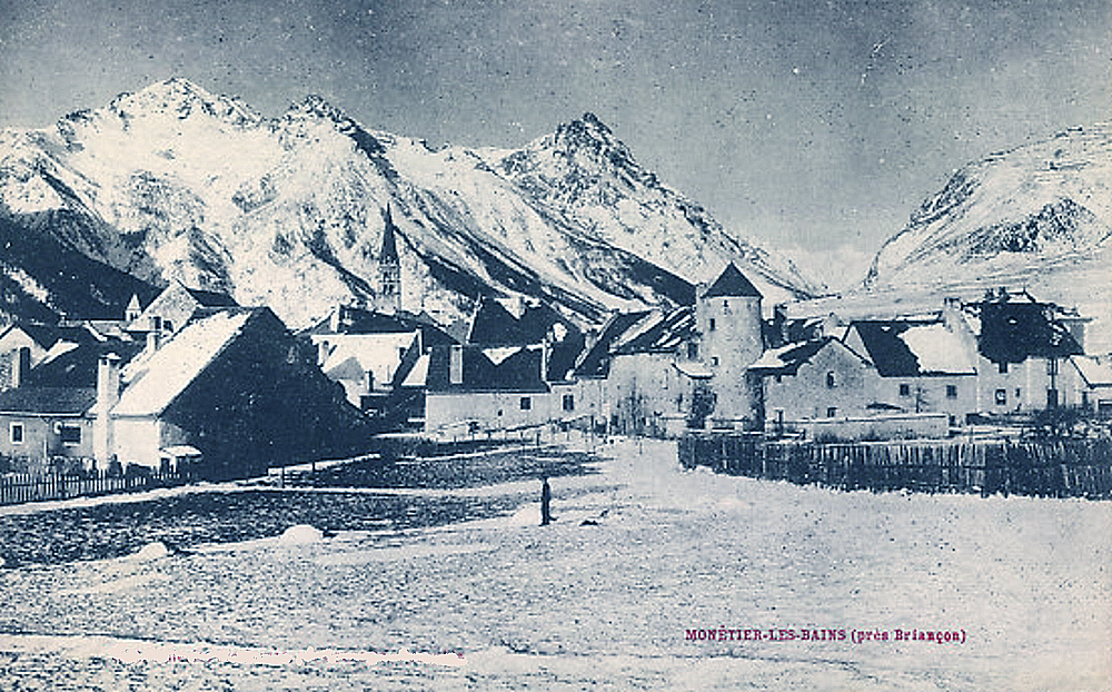 Monetier-les-Bains en hiver